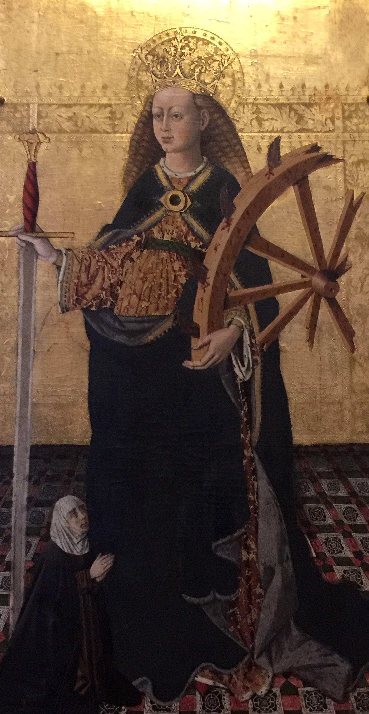 Église de la Nativité de la Vierge Marie de Villahermosa del Rio